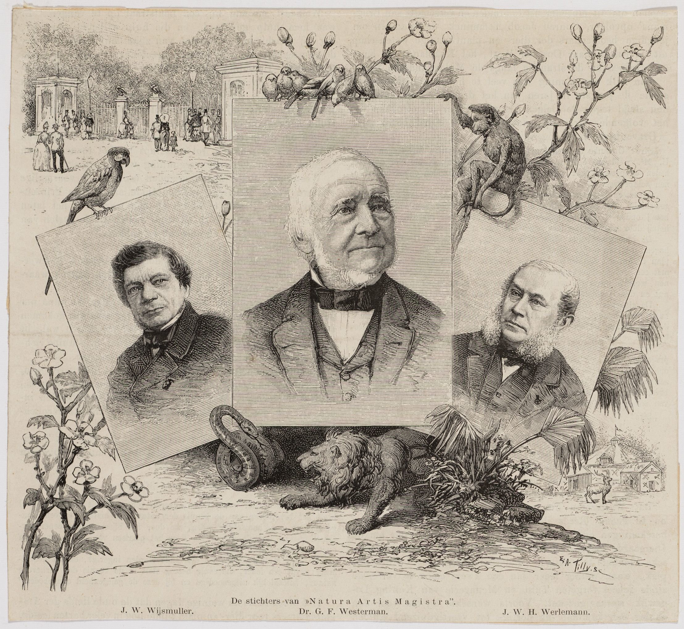 litho ter gelegenheid van het 50-jarig bestaan van Artis in 1888, met afbeeldingen van de oprichters J.J. Wijsmuller G.F. Westerman en J.W.H. Werlemann